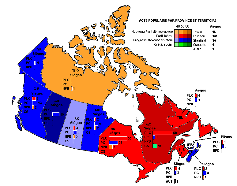 Carte du Canada démontrant le vote populaire lors de l'élection de 1974 avec barres graphiques indiquant le total des sièges de chaque province et territoire